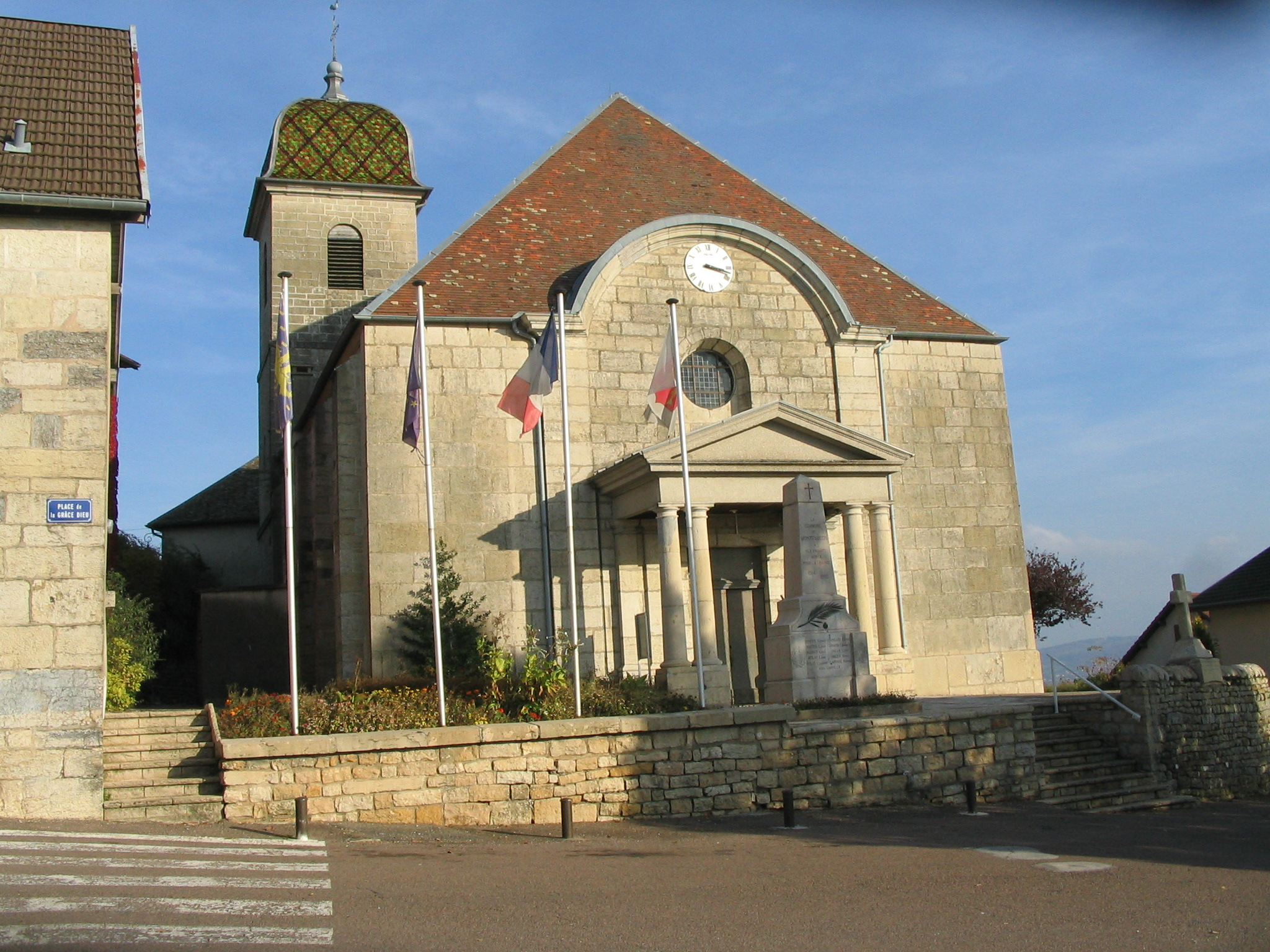 Église de la Nativité-de-Notre-Dame de Montfaucon